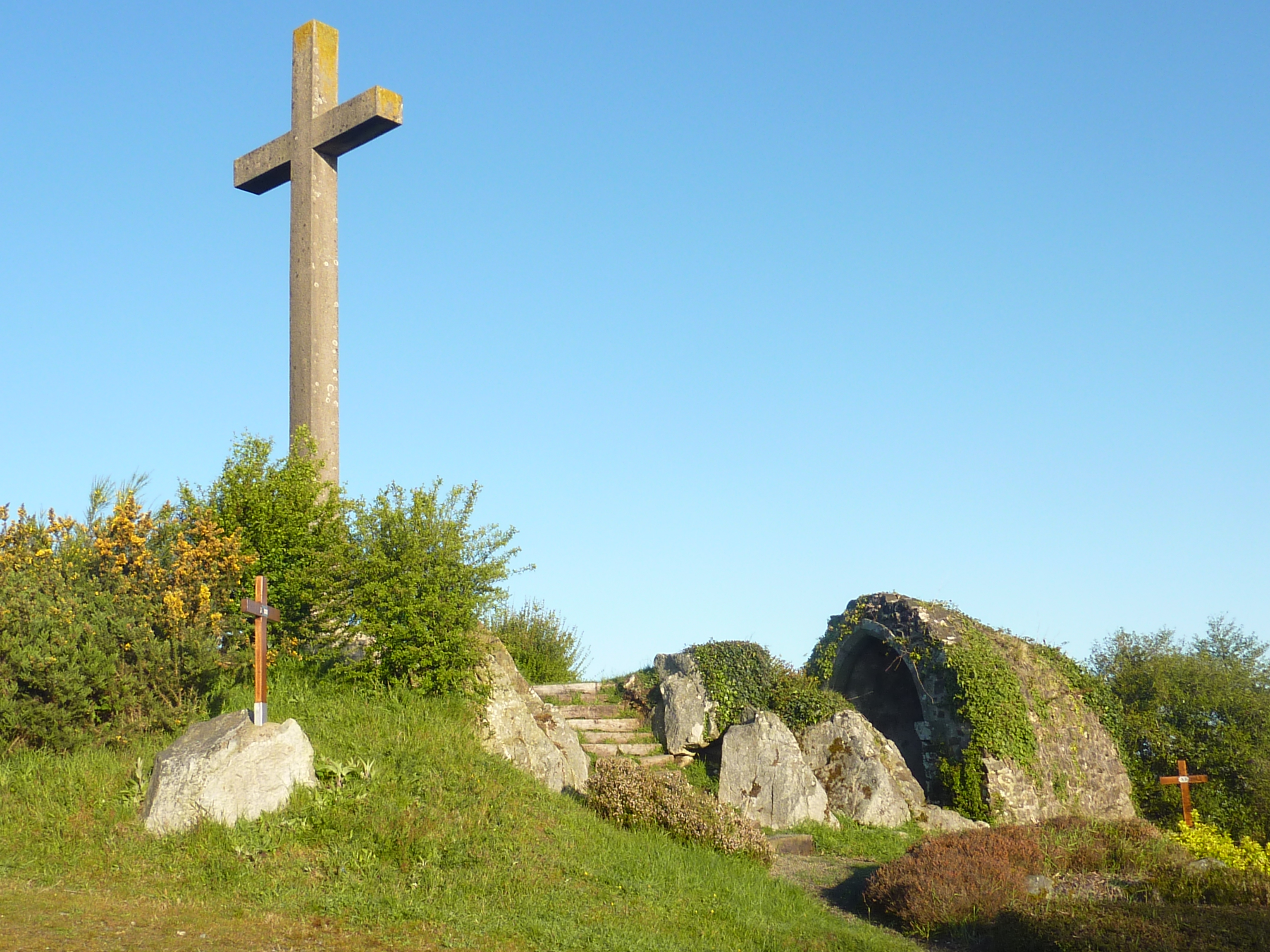 Lampaul-Guimiliau : La croix de Bégavel sur la "Butte du Télégraphe" ; elle est entourée de 14 stations d’un chemin de croix érigé par le père marianiste Jestin.